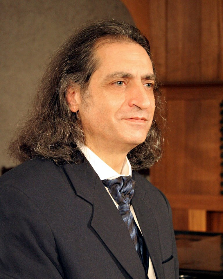 «Տաղարան» հնագույն երաժշտության համույթի ղեկավար, դիրիժոր